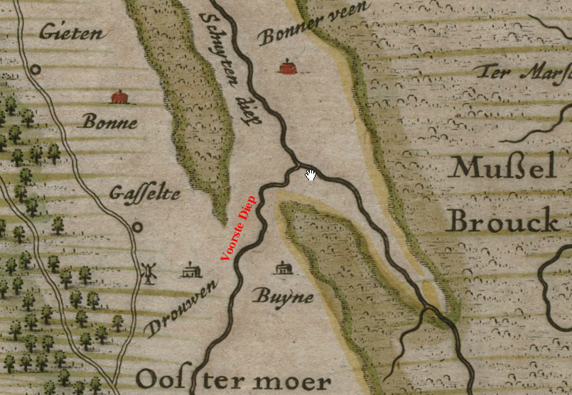 Detail van de kaart van Drenthe uit de atlas van Blaeu, rode tekst "Voorste Diep" door mij, uploader, toegevoegd